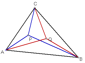 P en Q zijn isogonale verwanten (eigen illustratie)